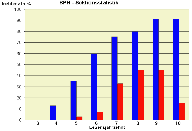 Statistik der BPH im Sektionsgut